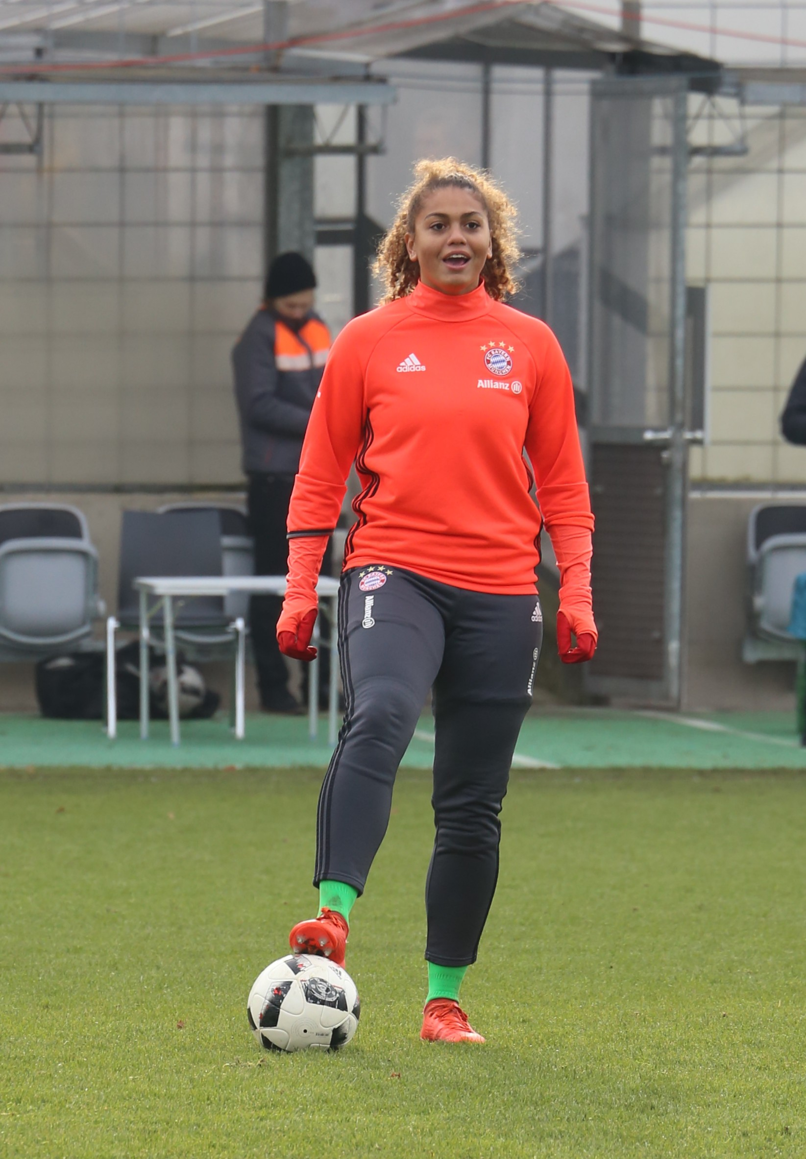 Jacintha Weimar (FC Bayern München) beim Aufwärmen vor dem Frauen-Bundesliga-Spiel FC Bayern München gegen 1. FFC Frankfurt am 13. November 2016 im Stadion an der Grünwalder Straße, München (Ergebnis war 1:0).